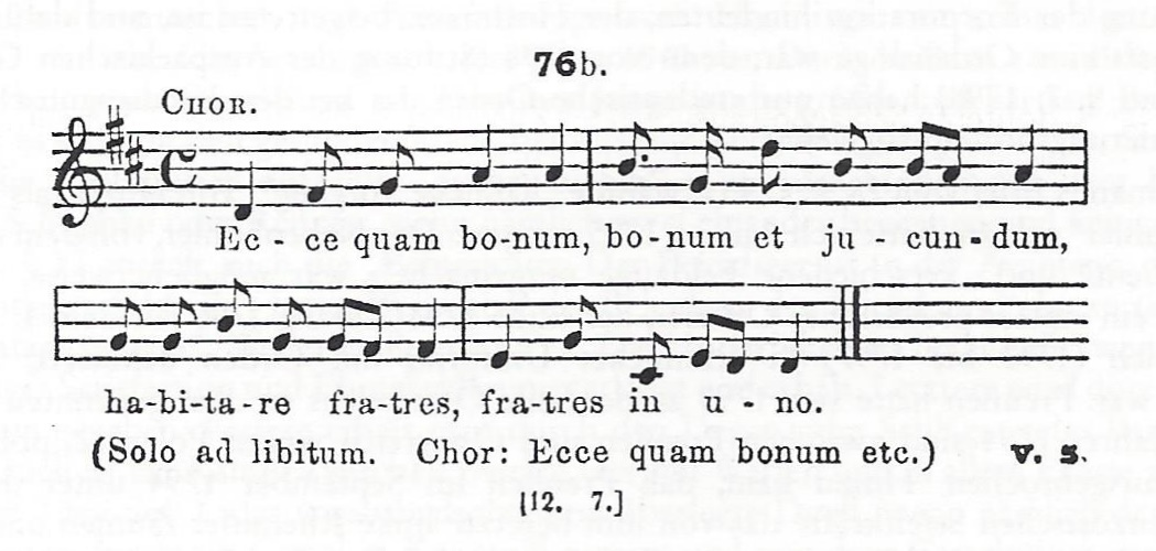 Melodie und Text des Rundgesangs Ecce quam bonum